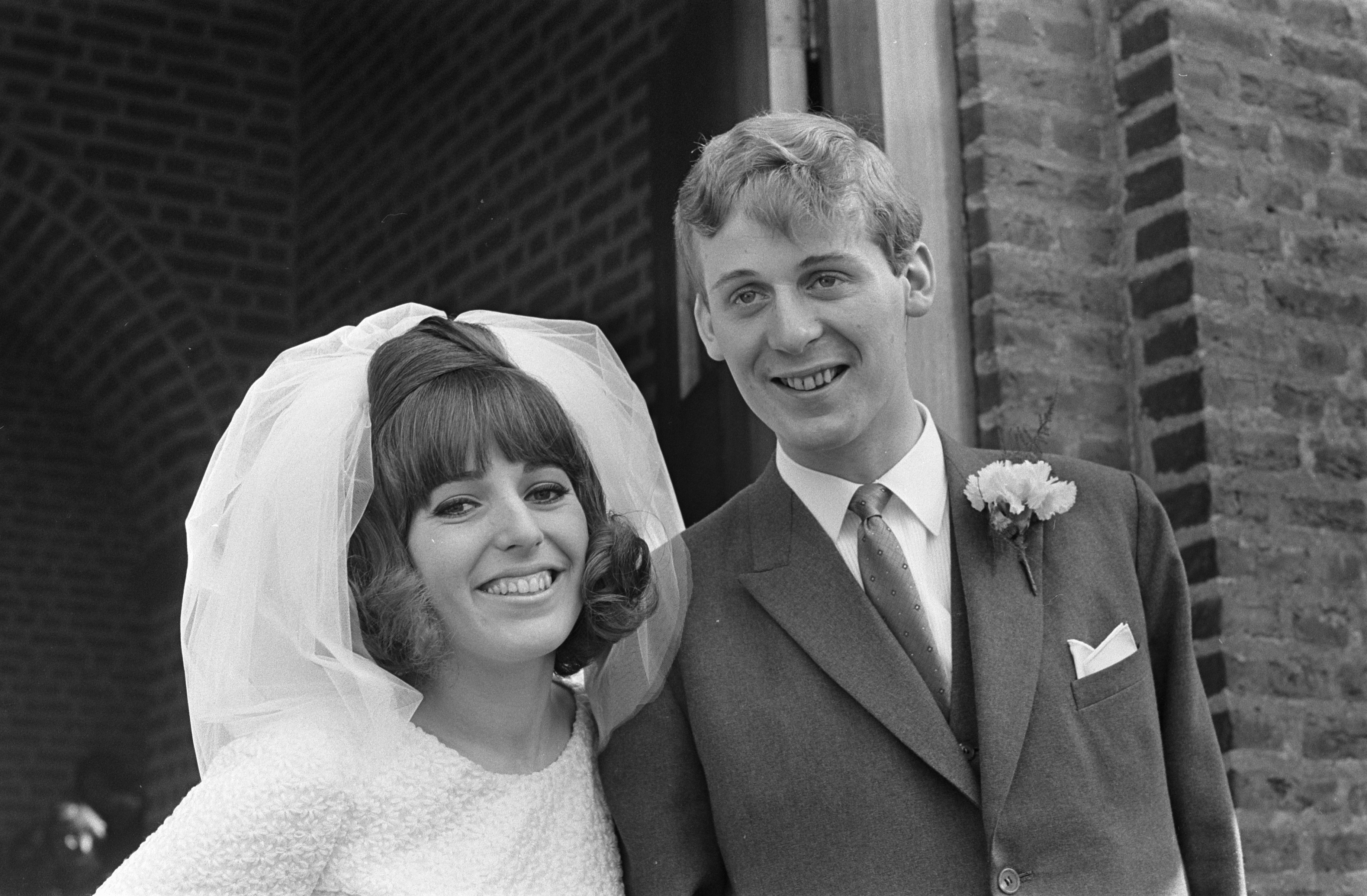 Collectie / Archief : Fotocollectie Anefo Reportage / Serie : [ onbekend ] Beschrijving : Huwelijk Trea Dobbs en Harry van Hooff te Eindhoven, hier bij stadhuis Datum : 16 maart 1967 Locatie : Eindhoven Trefwoorden : huwelijken, stadhuizen Persoonsnaam : Dobbs, Trea Fotograaf : Merk, Ben / Anefo Auteursrechthebbende : Nationaal Archief Materiaalsoort : Negatief (zwart/wit) Nummer archiefinventaris : bekijk toegang 2.24.01.05 Bestanddeelnummer : 920-1670